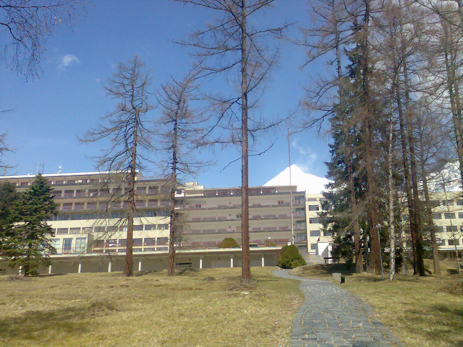 Vyšné Hágy, NÚTPCHaHCH